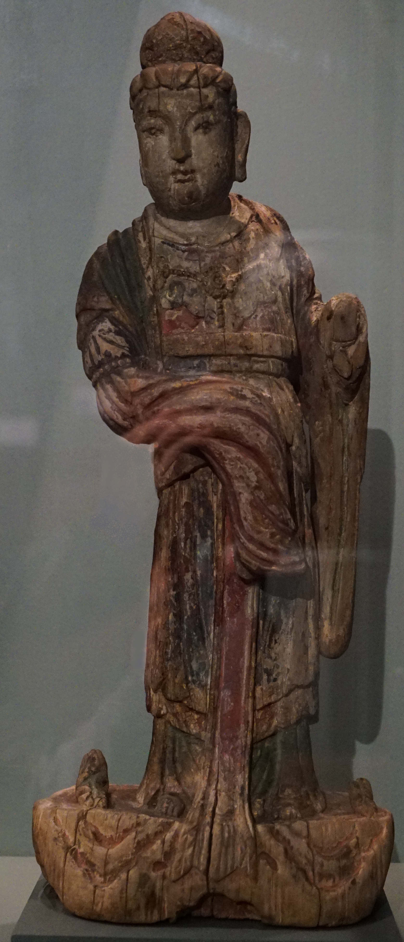 présenté loirs de l'Exposition Maurice Pierrat le goût de l'exotisme.